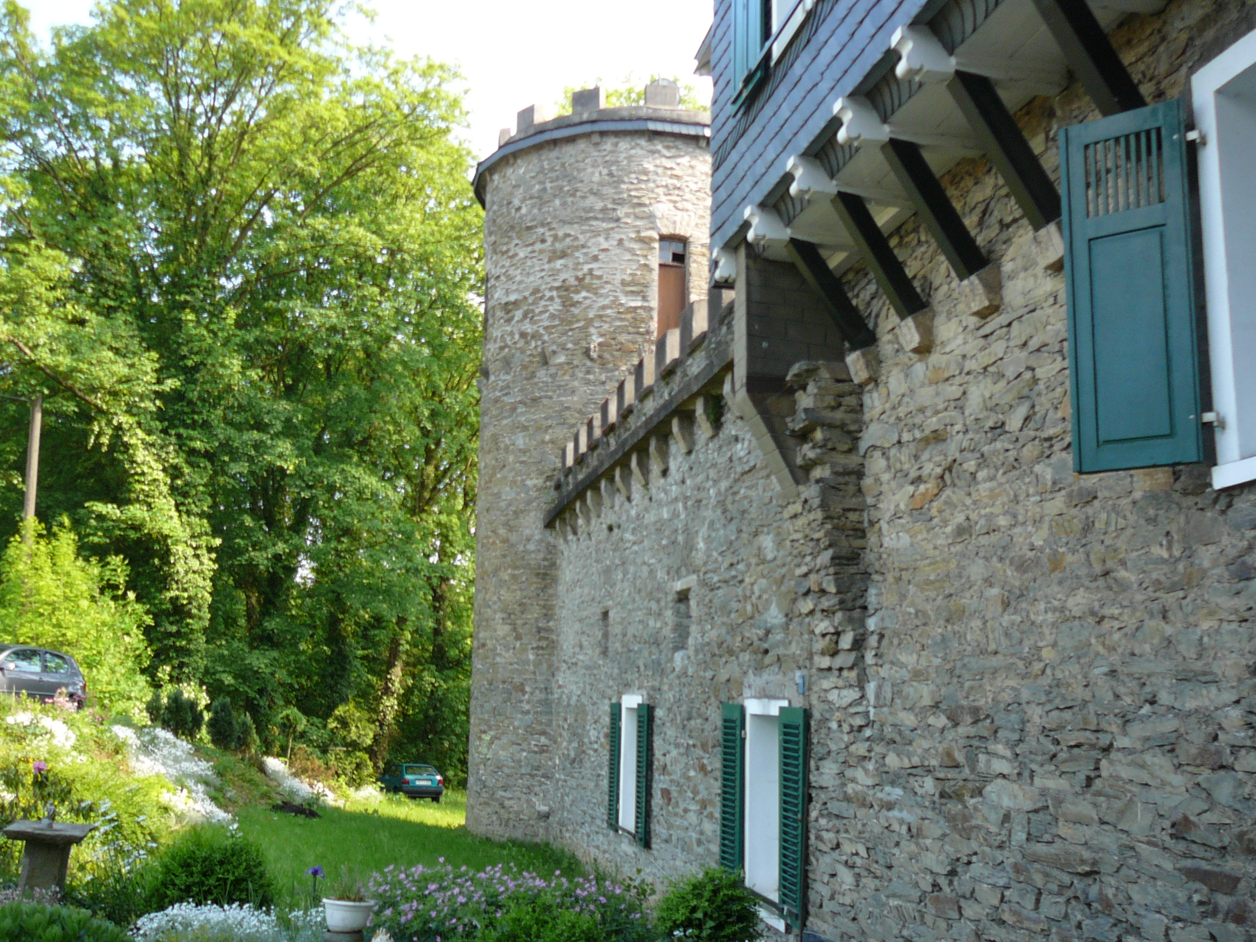 Schloss Aprath in Wülfrath an der Grenze zu Wuppertal